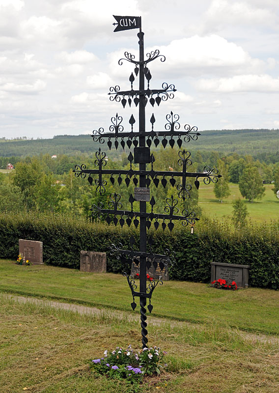 Ekshärads kyrka. Gravkors i järn där de flesta symboliserar livets träd med spelande löv